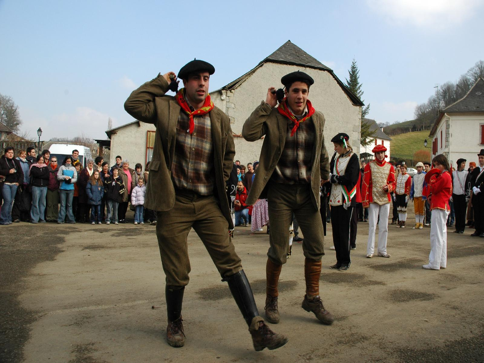 2006ko Urdiñarbeko Maskaradak Gameren. Khestuak. 2006ko otsailak 5.